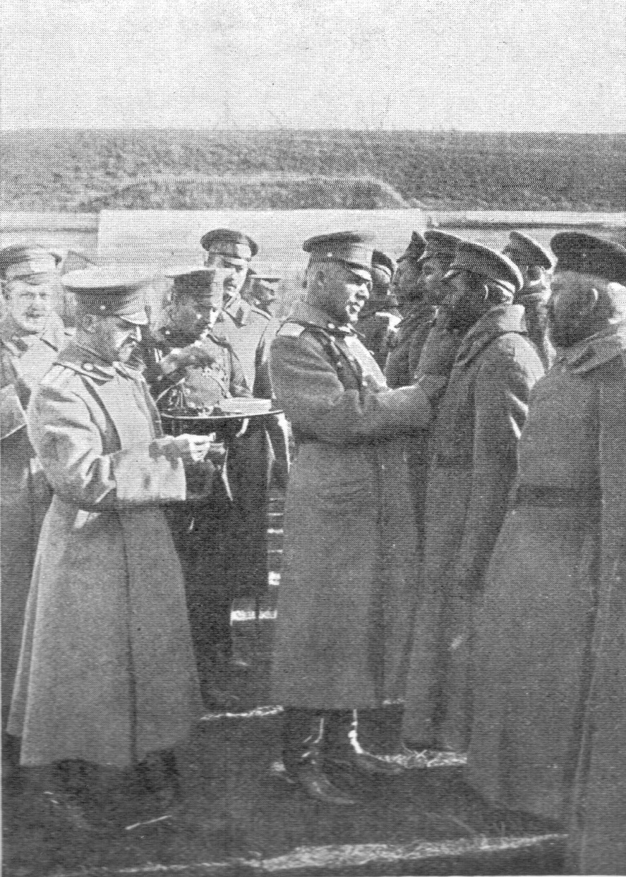 Генерал-майор А.В. фон-Шварц раздает Георгиевские кресты и медали гарнизону крепости Ивангорода 17 октября, на 4-й день после отступления германцев.